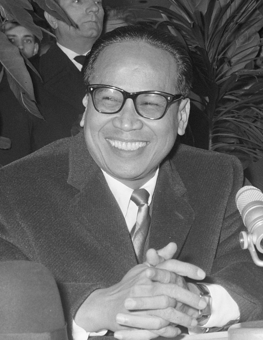 Aankomst minister Soebandrio Indonesie en echtgenote op Schiphol, tijdens persconferentie